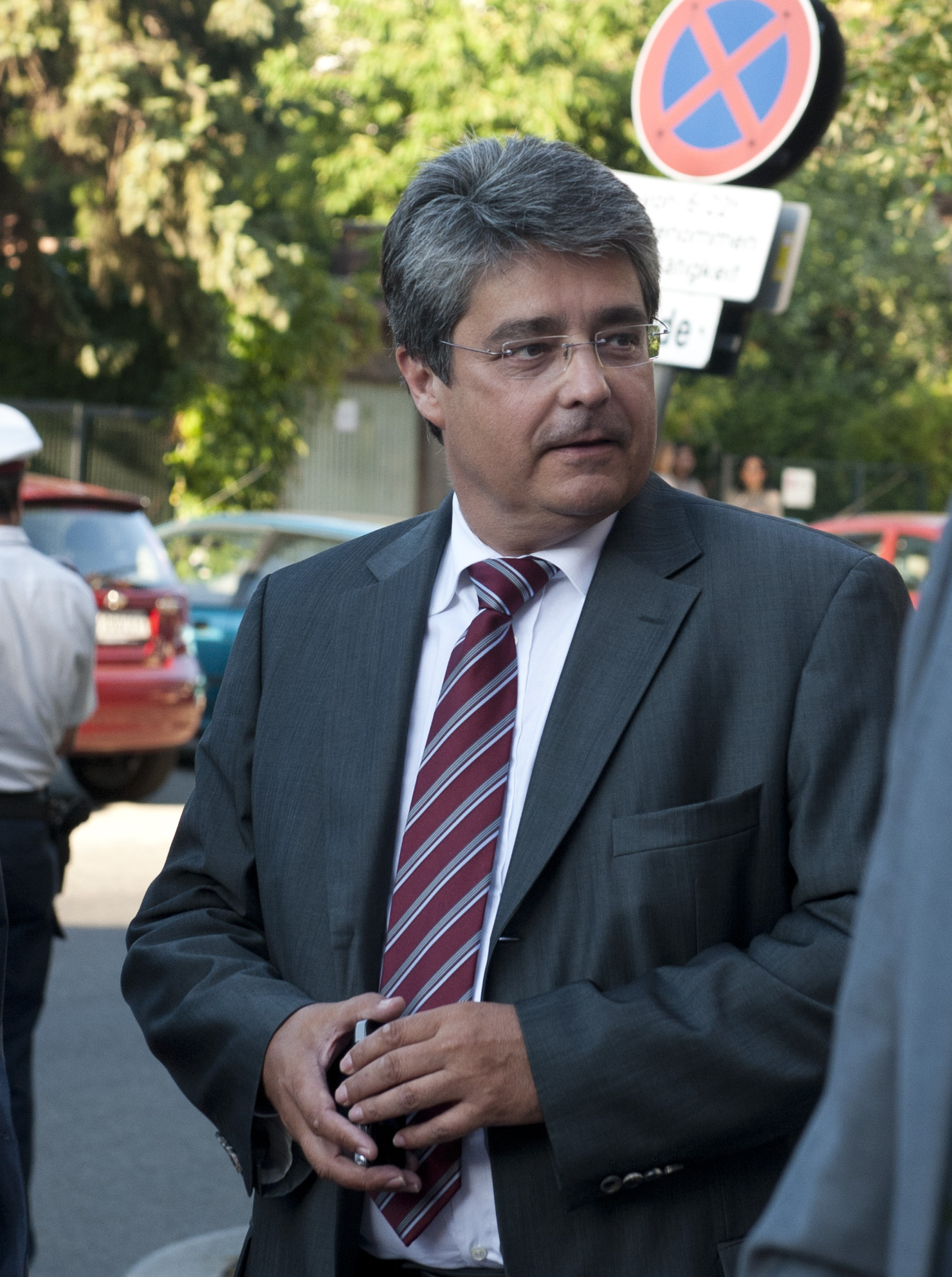 Sommerfest der SPÖ 2011 _DSC9262